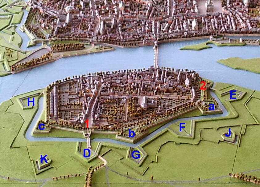 Detail van de Maquette van Maastricht, een kopie uit 1974-1982 van originele, 18e-eeuwse maquette vervaardigd in opdracht van koning Lodewijk XV van Frankrijk, tegenwoordig in het Palais des Beaux-Arts in Lille. De kopie wordt tentoongesteld in Centre Céramique in Maastricht. Dit gedeelte toont de vestingwerken van de voorstad Wyck omstreeks 1750 met o.a. de Duitse, Aker- of Hoogbruggepoort (1) en de Sint-Maartenspoort (2).